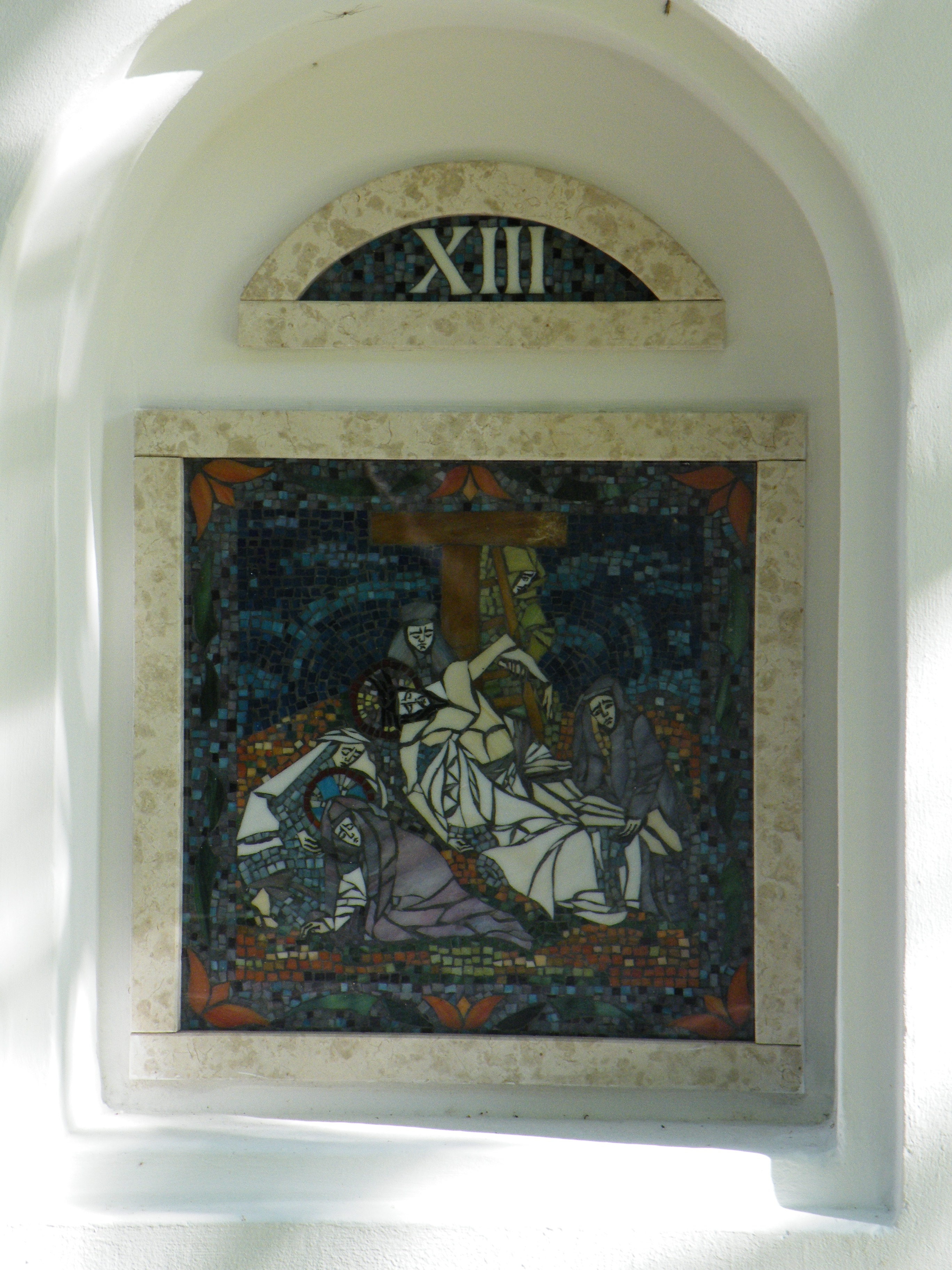 Stációk a Palóc ligetben, Balassagyarmaton